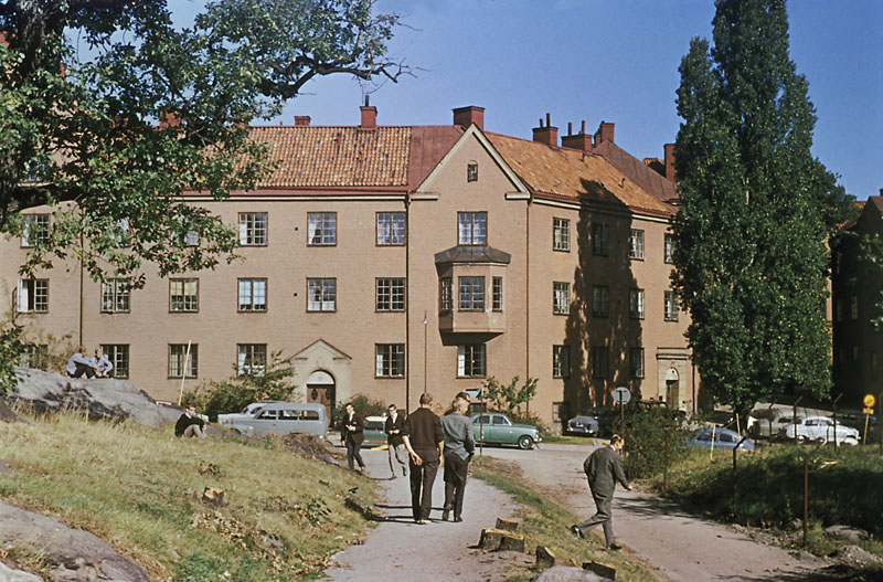 Bostadshus vid Geiersvägen i kvarteret Ängsknarren